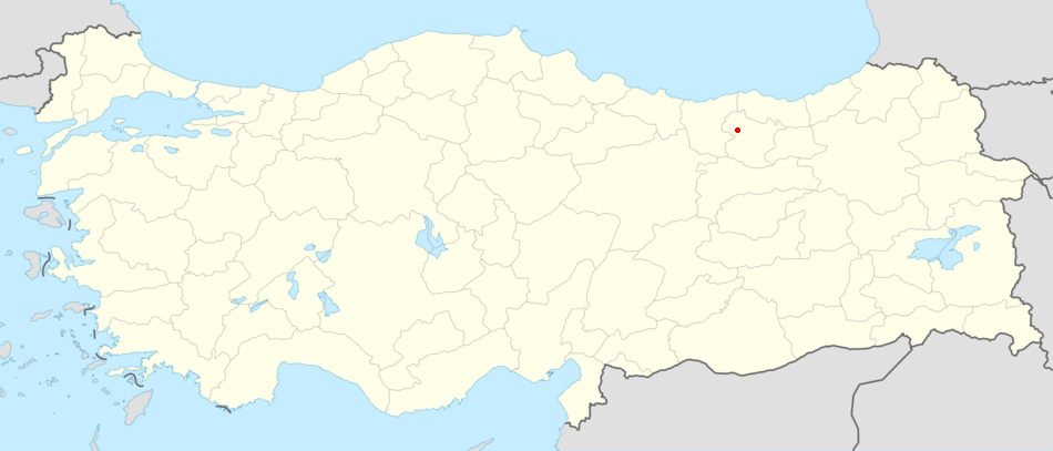 Quadratische Plattkarte, N-S-Streckung 120 %. Geographische Begrenzung der Karte: N: 42.5° N S: 35.5° N W: 25.4° O O: 45.0° O Equirectangular projection, N/S stretching 120 %. Geographic limits of the map: N: 42.5° N S: 35.5° N W: 25.4° E E: 45.0° E